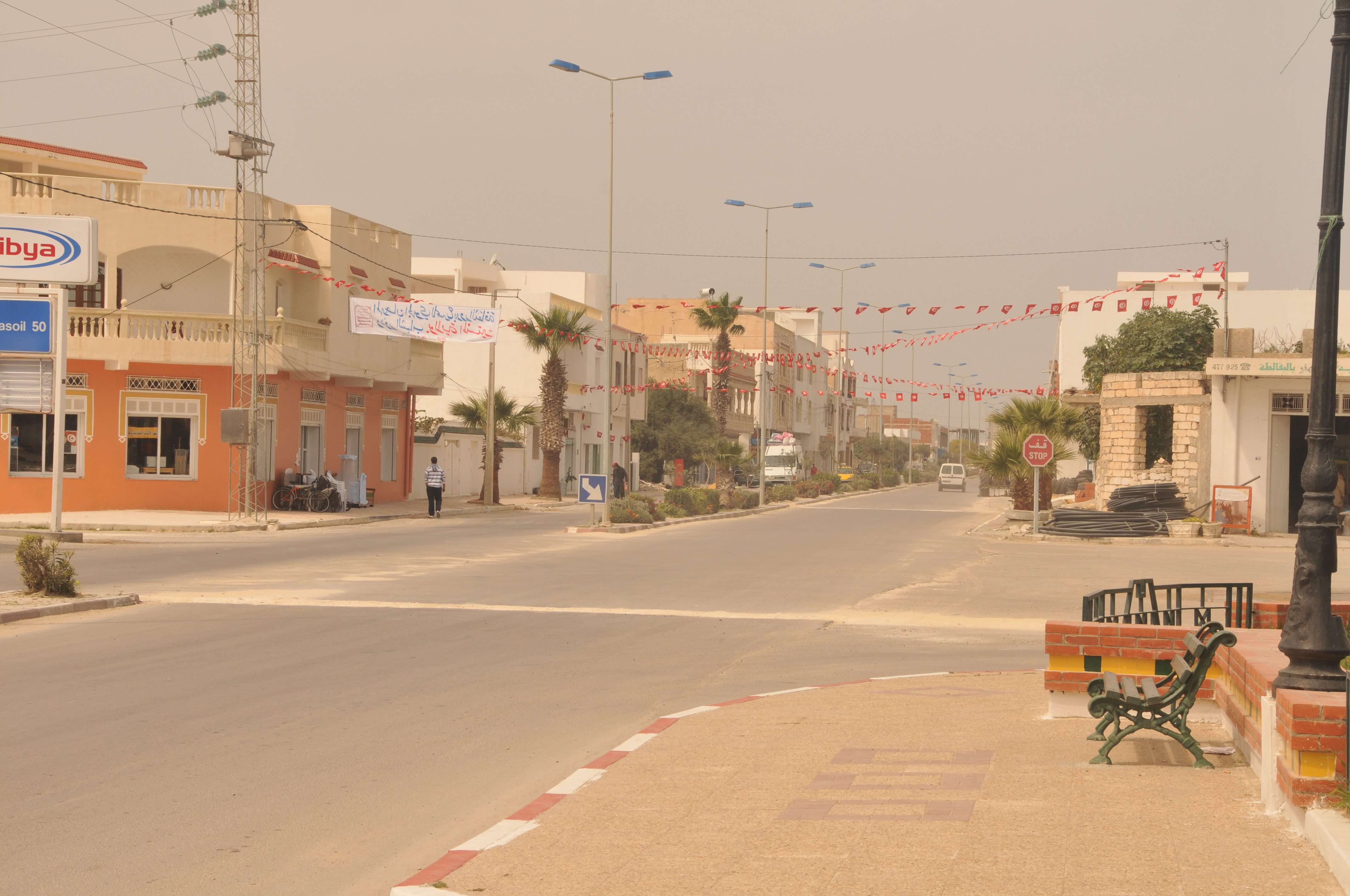 Croisement au centre ville de Beklata